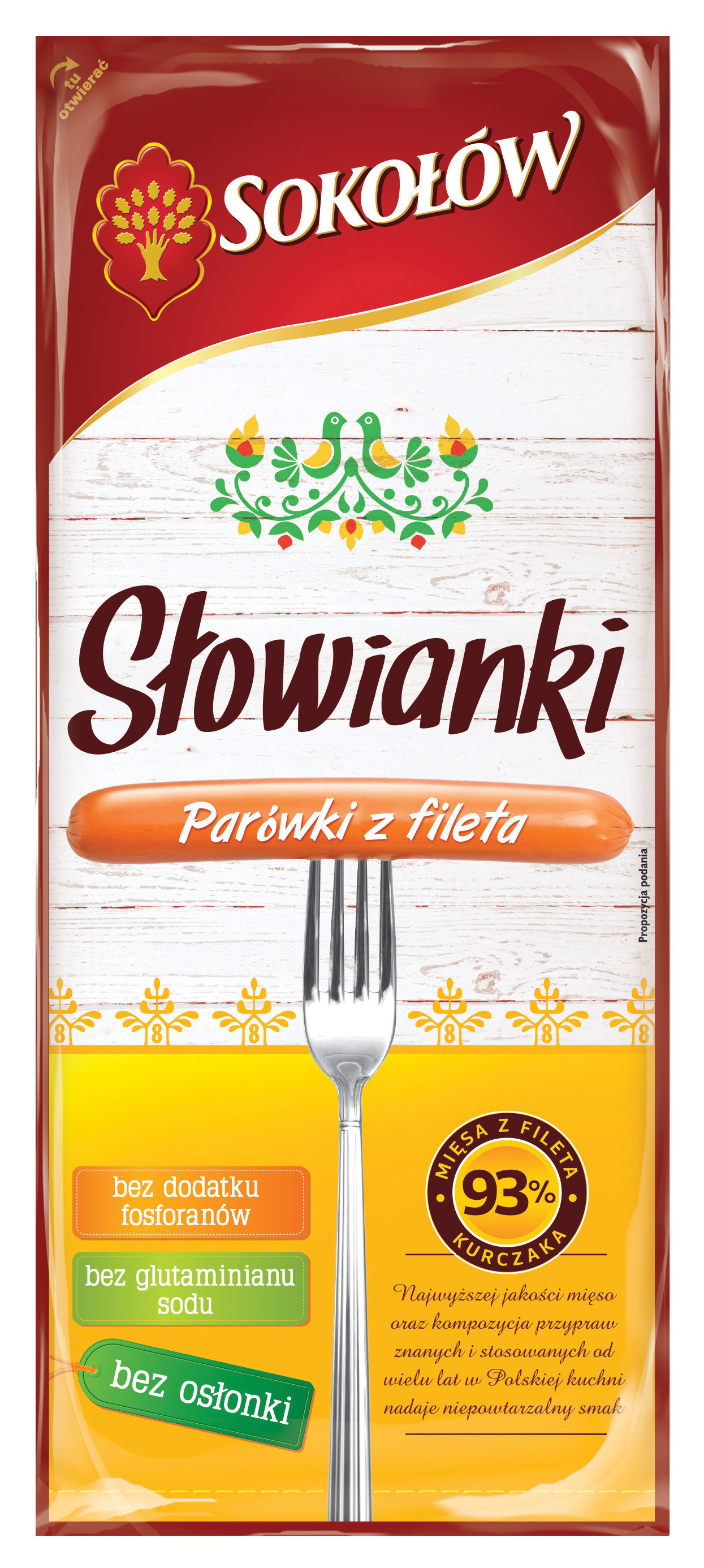 Sokołów S.A. Słowianki z Fileta